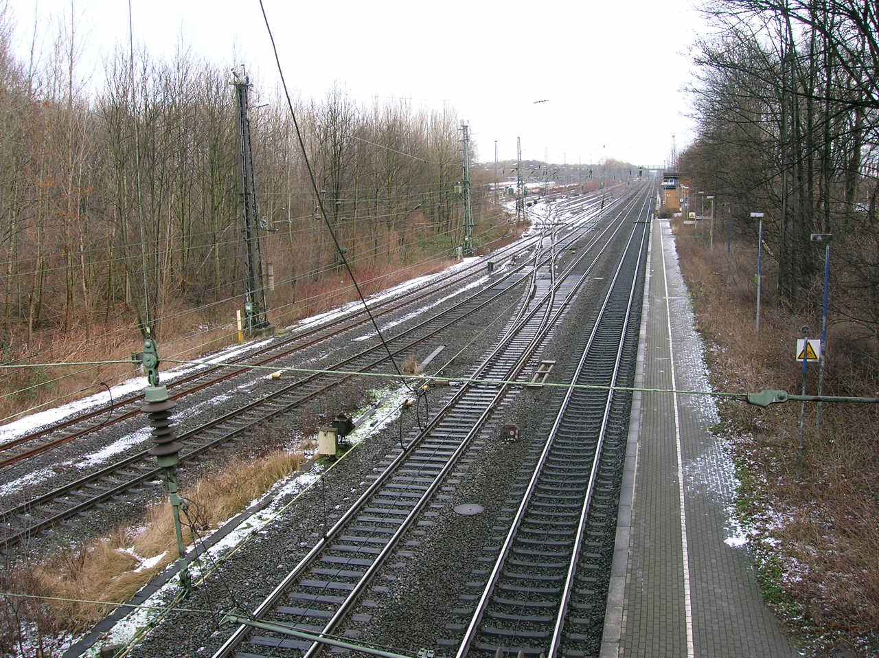 Bahnhof Dortmund-Scharnhorst